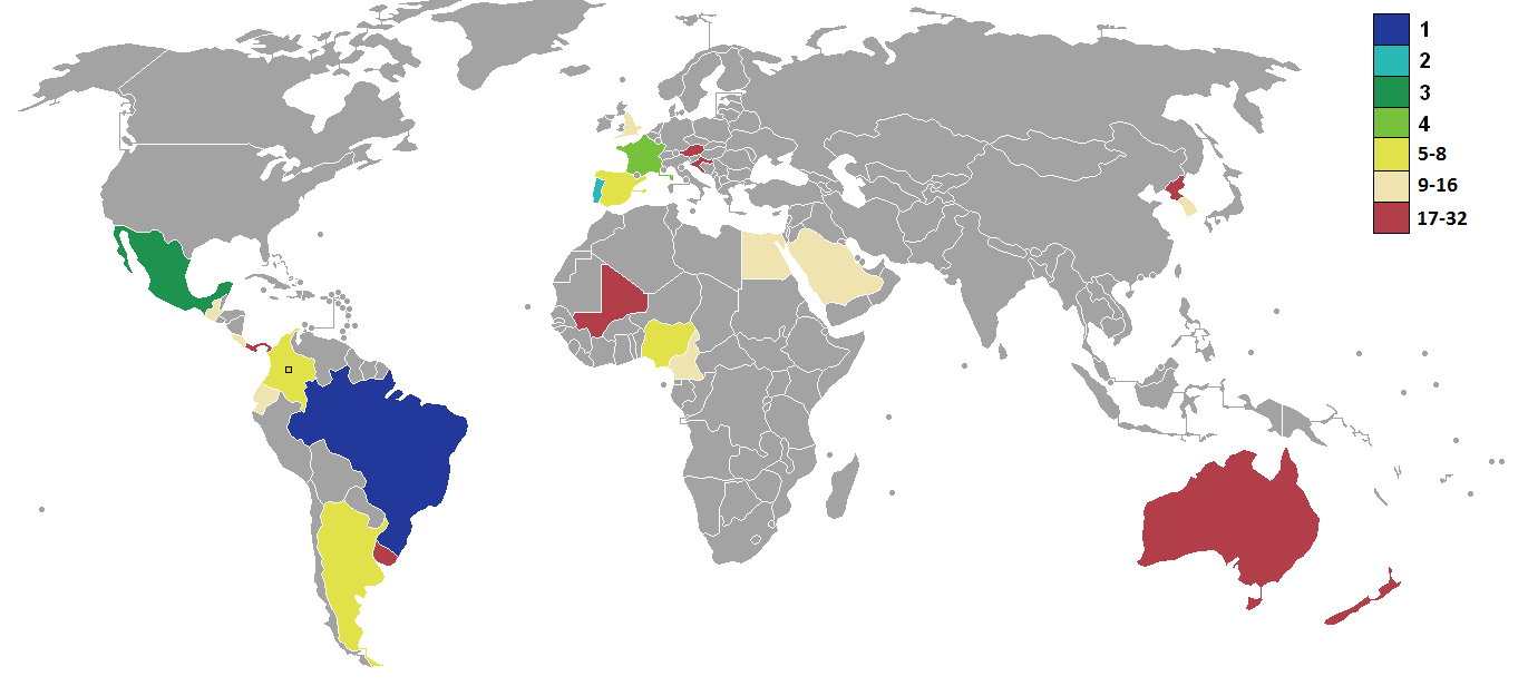 සිංහල: Mapa de los resultados del torneo.